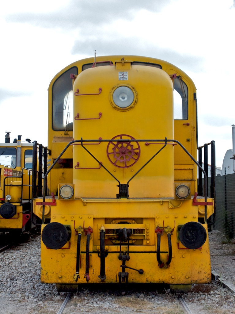 Local: Estação do Poceirão [Linha do Alentejo, PK 30] Data e hora: 31 de Agosto de 2008 [11h14] Material: Locomotiva 1512 [Alco] N.º UIC: 90 94 200 0017-8 P (Ferrovias MVLM 08)